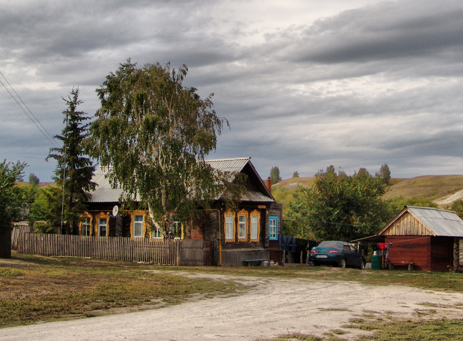 Село Сенькино, дом в конце улицы Ленинградской